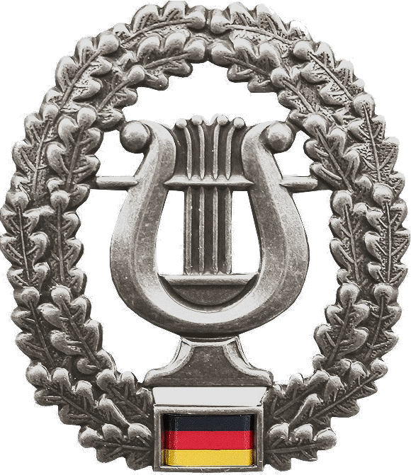 Barettabzeichen der Militärmusikdienst der Bundeswehr früher Musikkorps Barettfarbe: Gemäß der ergänzenden Tragebestimmungen Marineblau (Luftwaffe) Maße: Hoch: 53mm Breit: 46mm Ausführung: altsilber, Metall